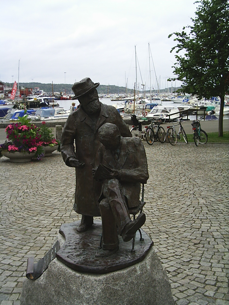 Skulptur i Strömstad som föreställer Kostervalsens och Tjo! Uppå Backamos textförfattare Göran Svenning och kompositör David Hellström. Fotograf:Tubaist